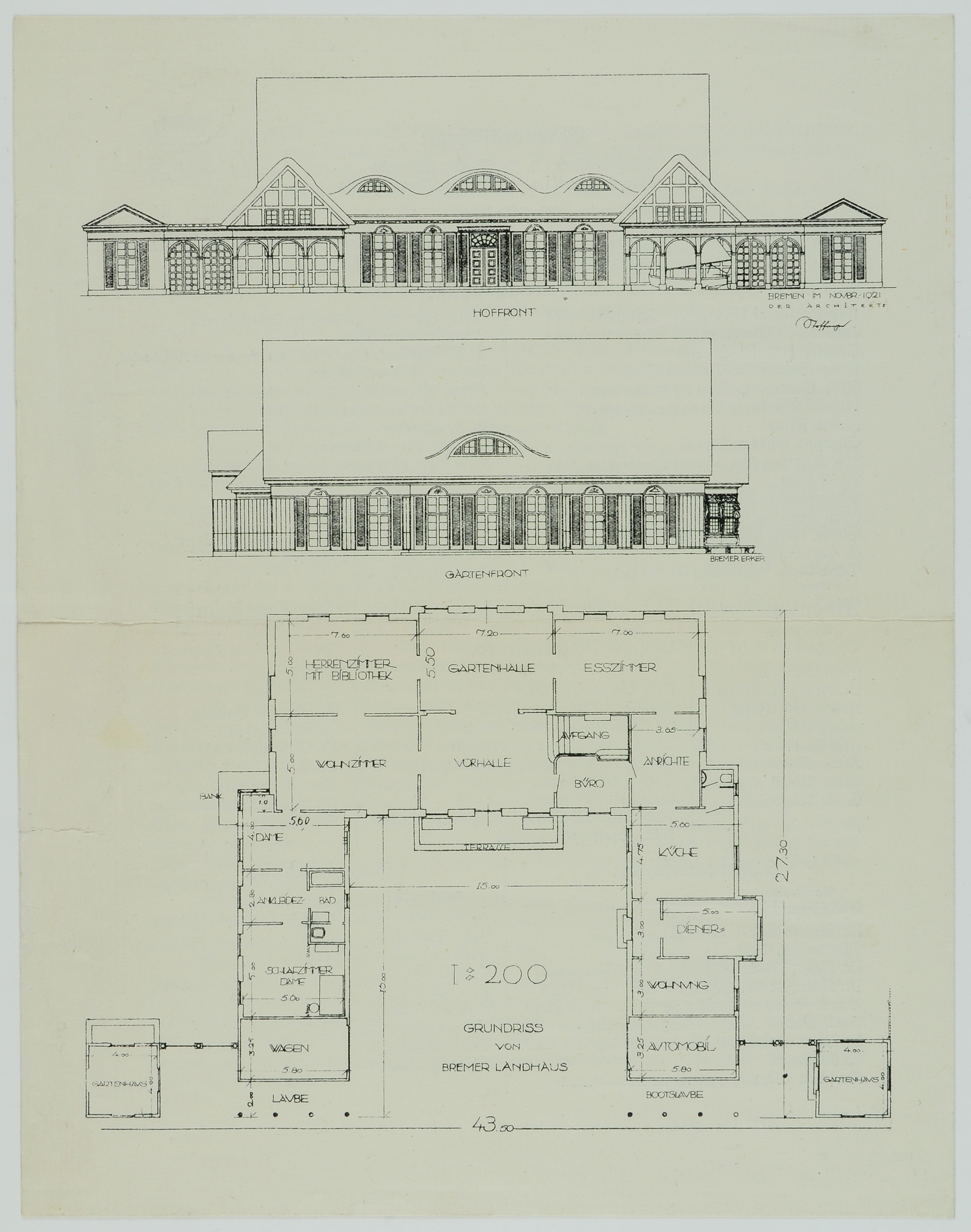 Ansichtsskizzen Bremer Landhaus (Blatt 2)